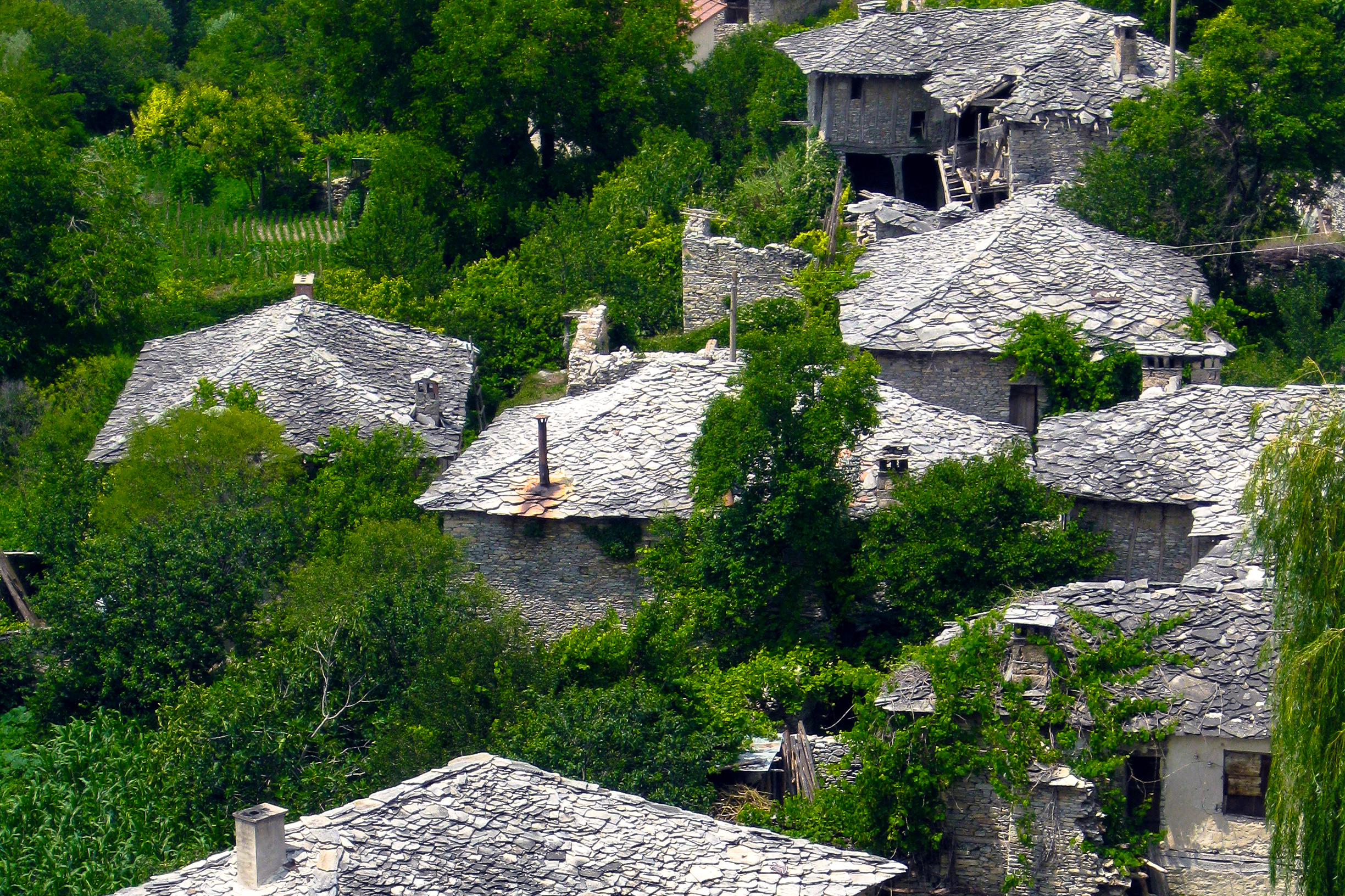 Поглед към възрожденски къщи в Туховища.